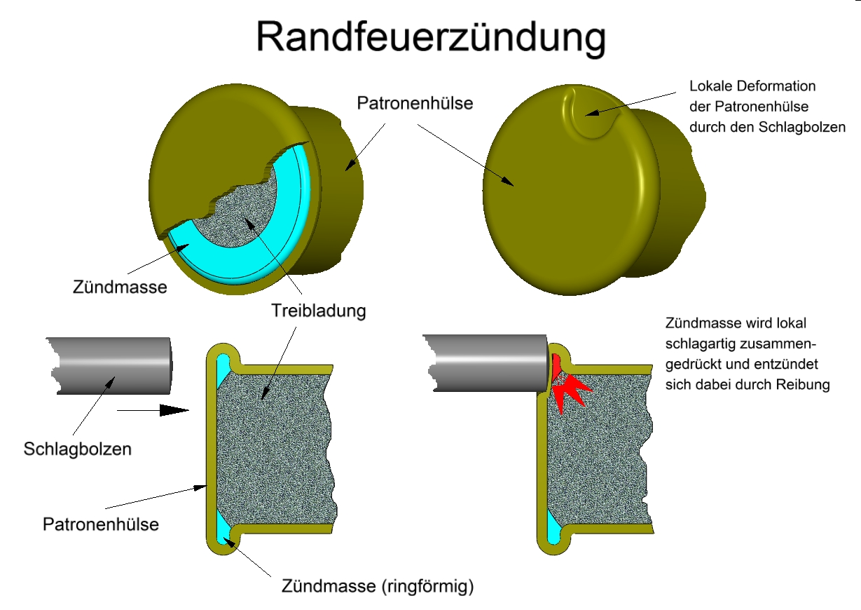 Aufbau und Zündung einer Randfeuerpatrone